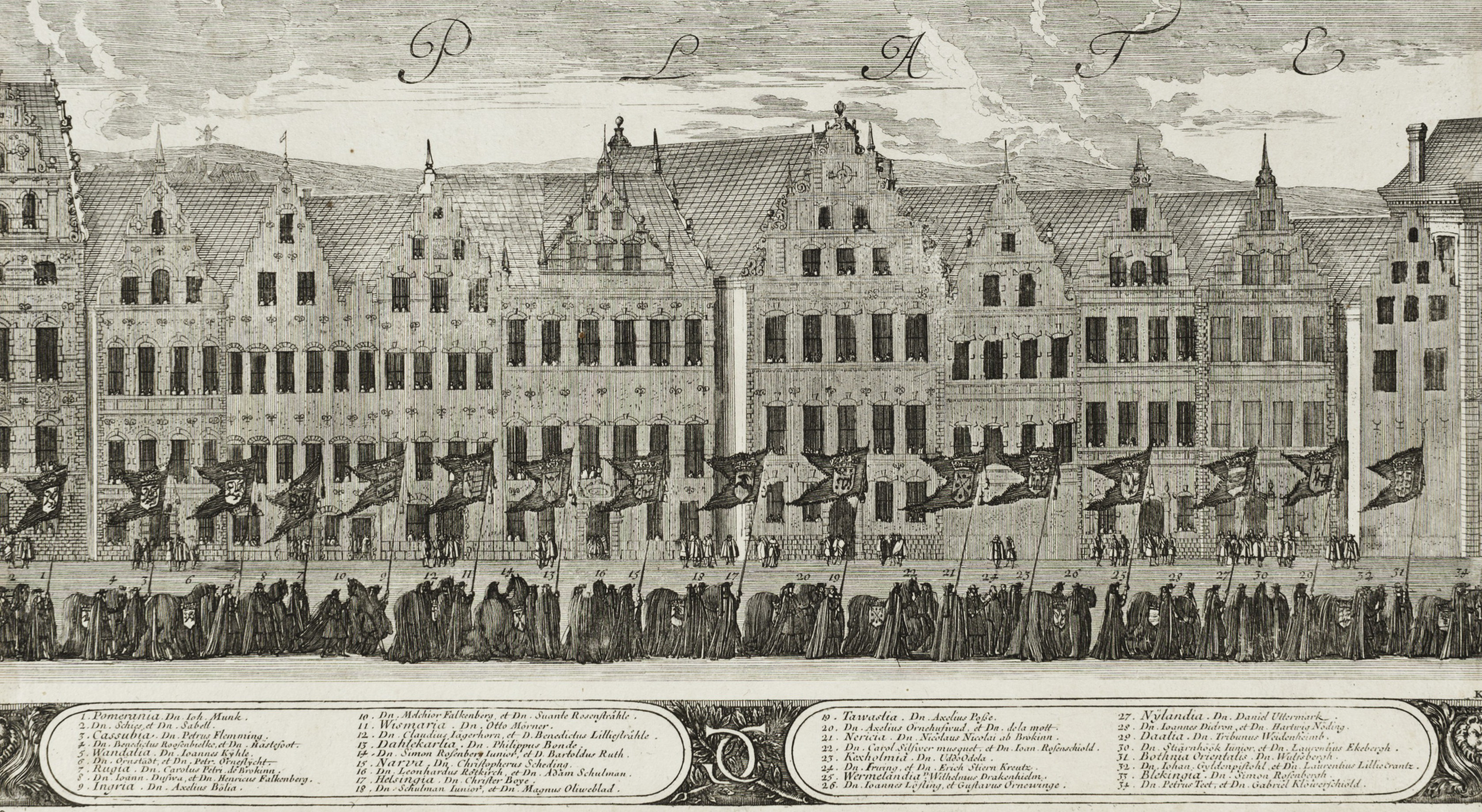 Kopparstick med motiv från Karl X Gustavs begravningståg den 4 november 1660, graverat av Jean Le Pautre efter teckning av Erik Dahlbergh, visande Stora Nygatans byggnader i kvarteren Thisbe (t.h.) och Pyramus